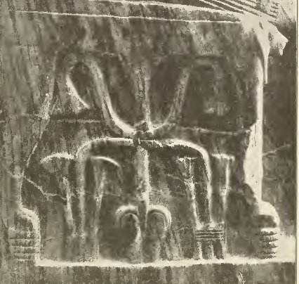 Detail der Statue des Chephren aus seinem Taltempel in Giza, heute im Ägyptischen Museum, Kairo (CG 14). Darstellung der Vereinigung der beiden Länder (sema-taui).